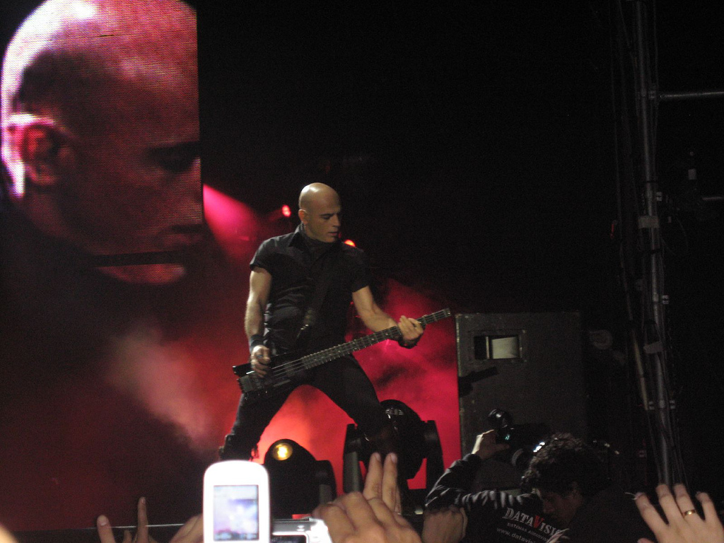 Recital de Soda Stereo en Lima, Perú. En la foto Zeta Bosio. La nota discordante de la velada fue un desperfecto técnico que dejó literalmente muda a la trilogía cuando esta tocaba el cuarto tema de la noche.